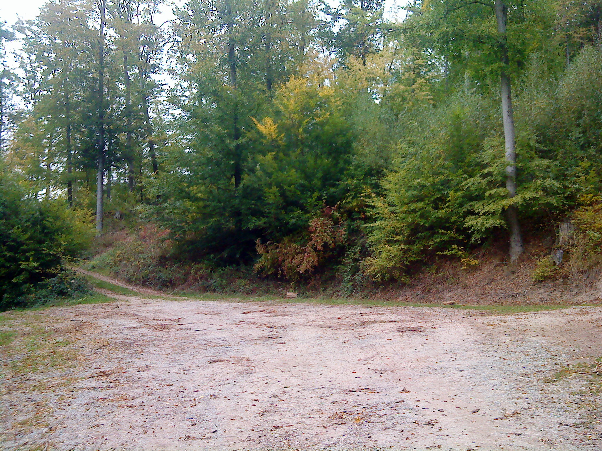 Der ehemalige Standort des Rothenberger Hofes zwischen Mömbris und Geiselbach